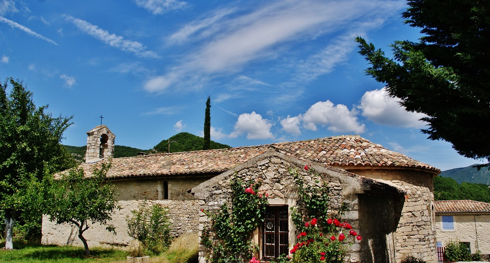 église St Etienne